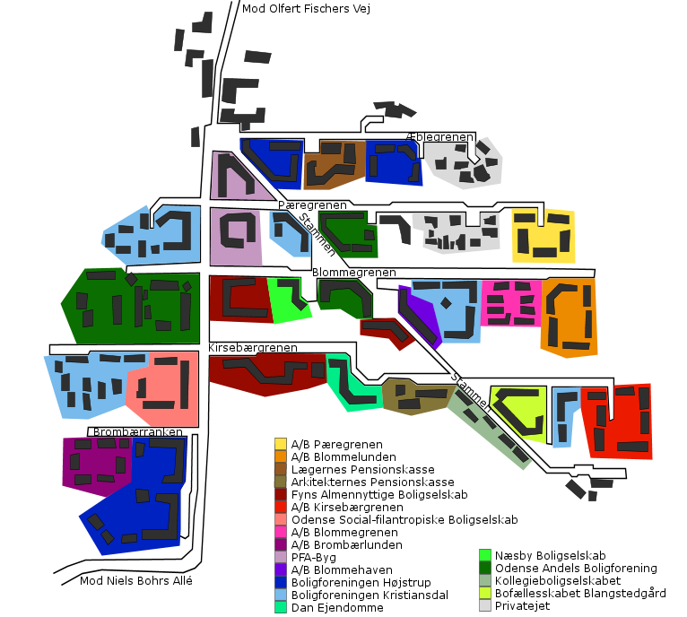 Kort over ejerfordelingen af bygningerne i Blangstedgård-kvarteret i Odense SØ